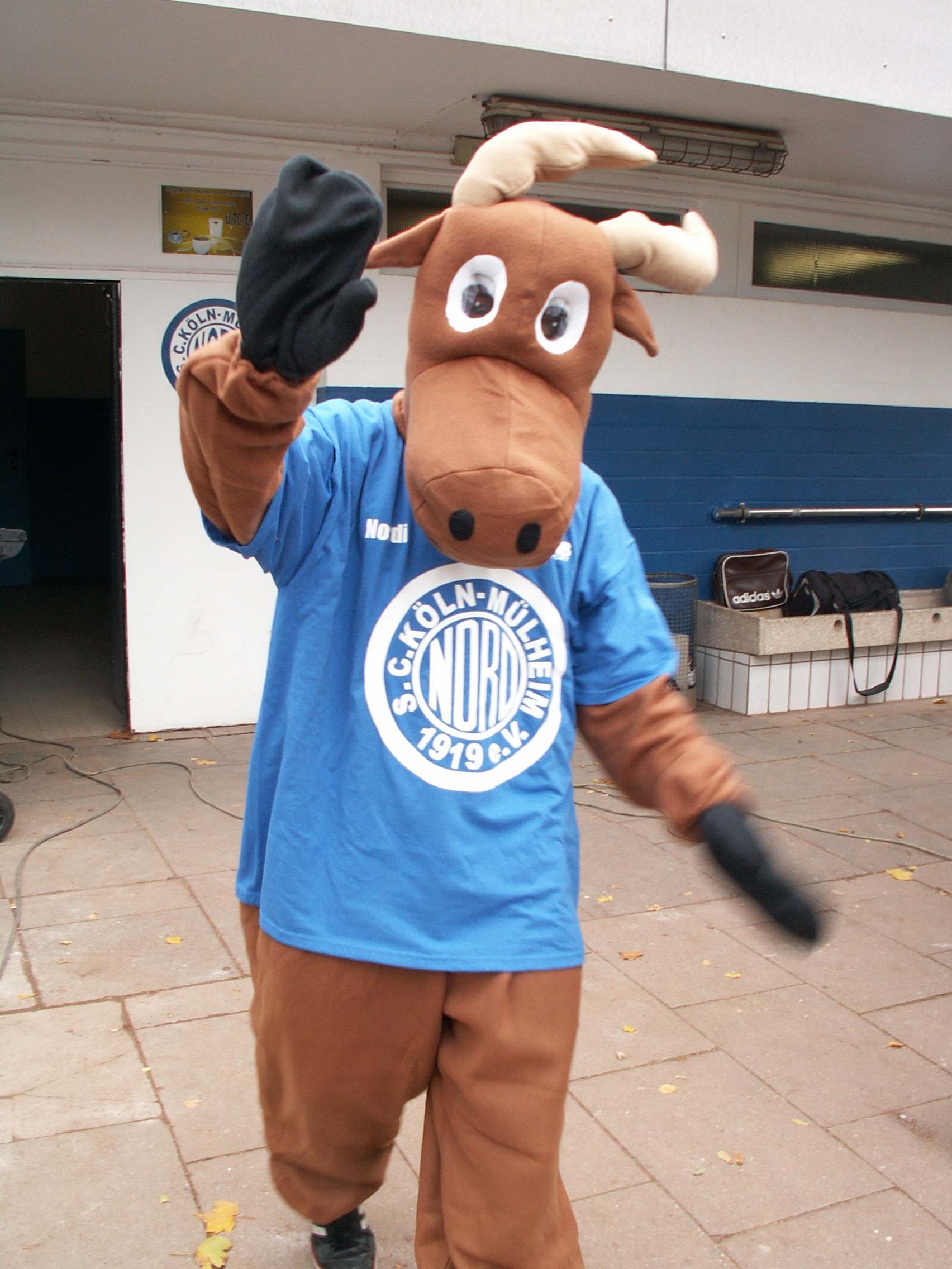 Maskottchen